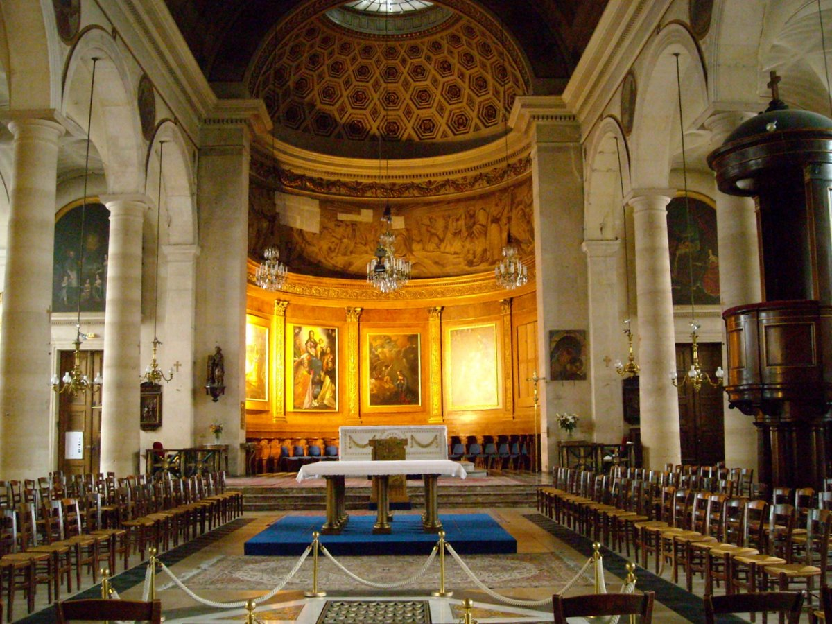 Chœur et nef de l'église Notre-Dame de Bonne-Nouvelle